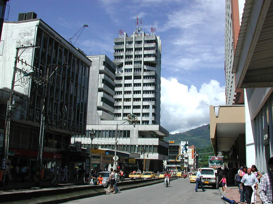 Centro